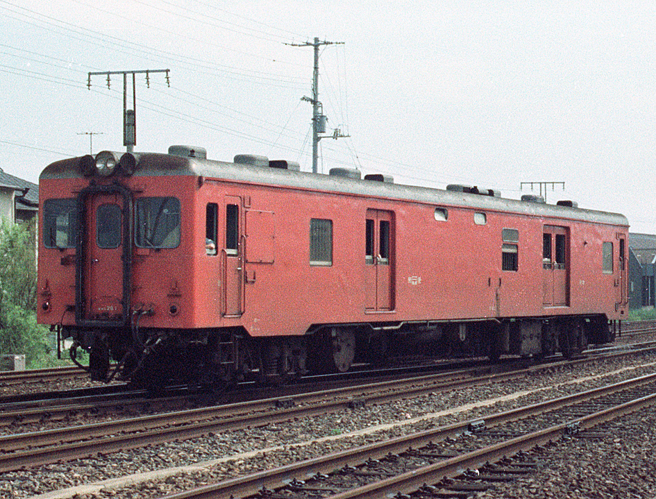 国鉄 キユニ26 1（首都圏色塗装変更後）